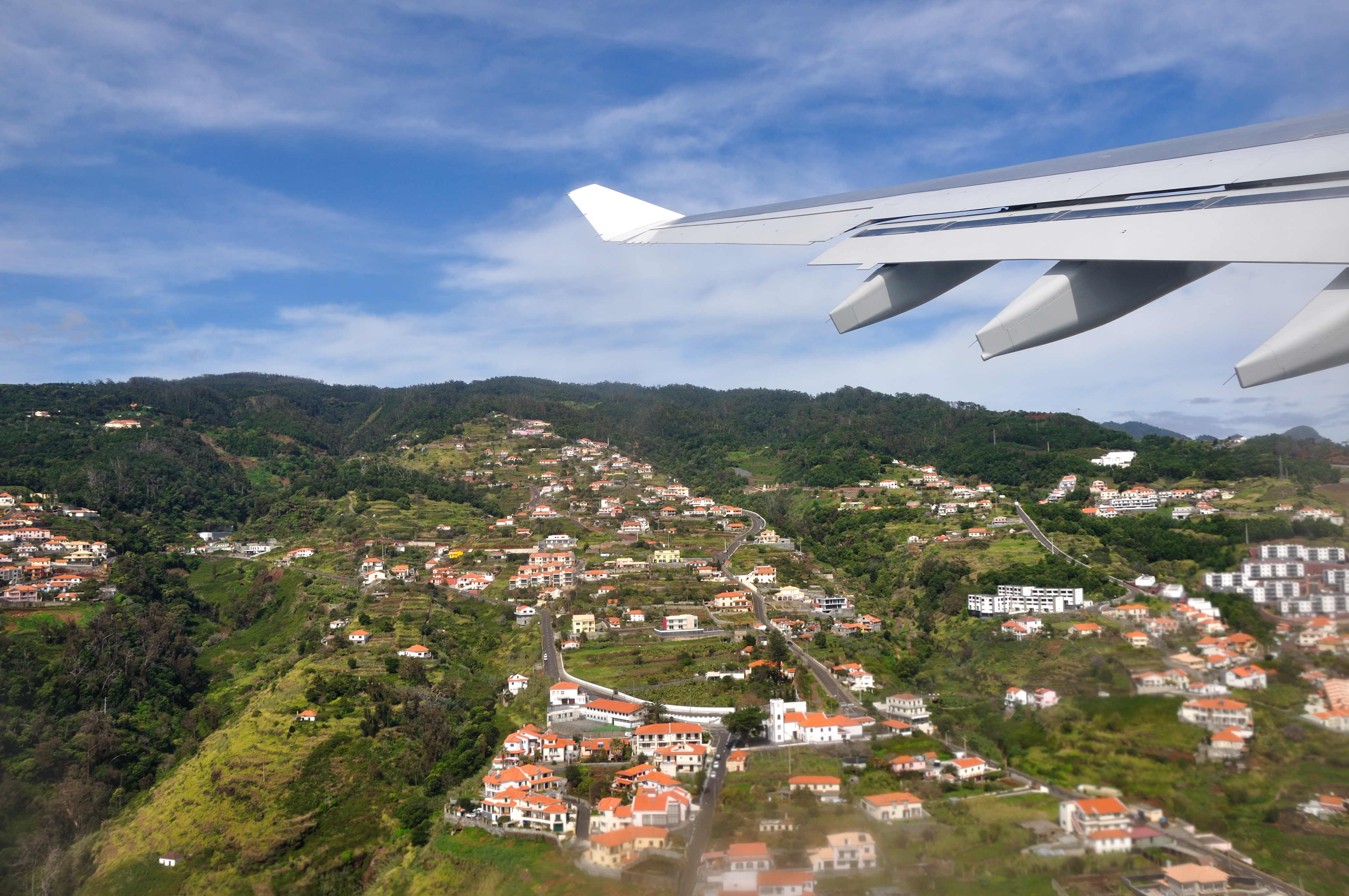 Portugal, Climbing out of Funchal across Ponta de São Lourenço